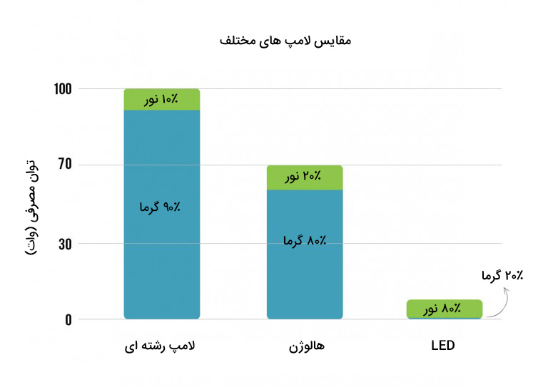 مقایسه انرژی مصرفی لامپ های ال ای دی، رشته ای و هالوژن با نور برابر